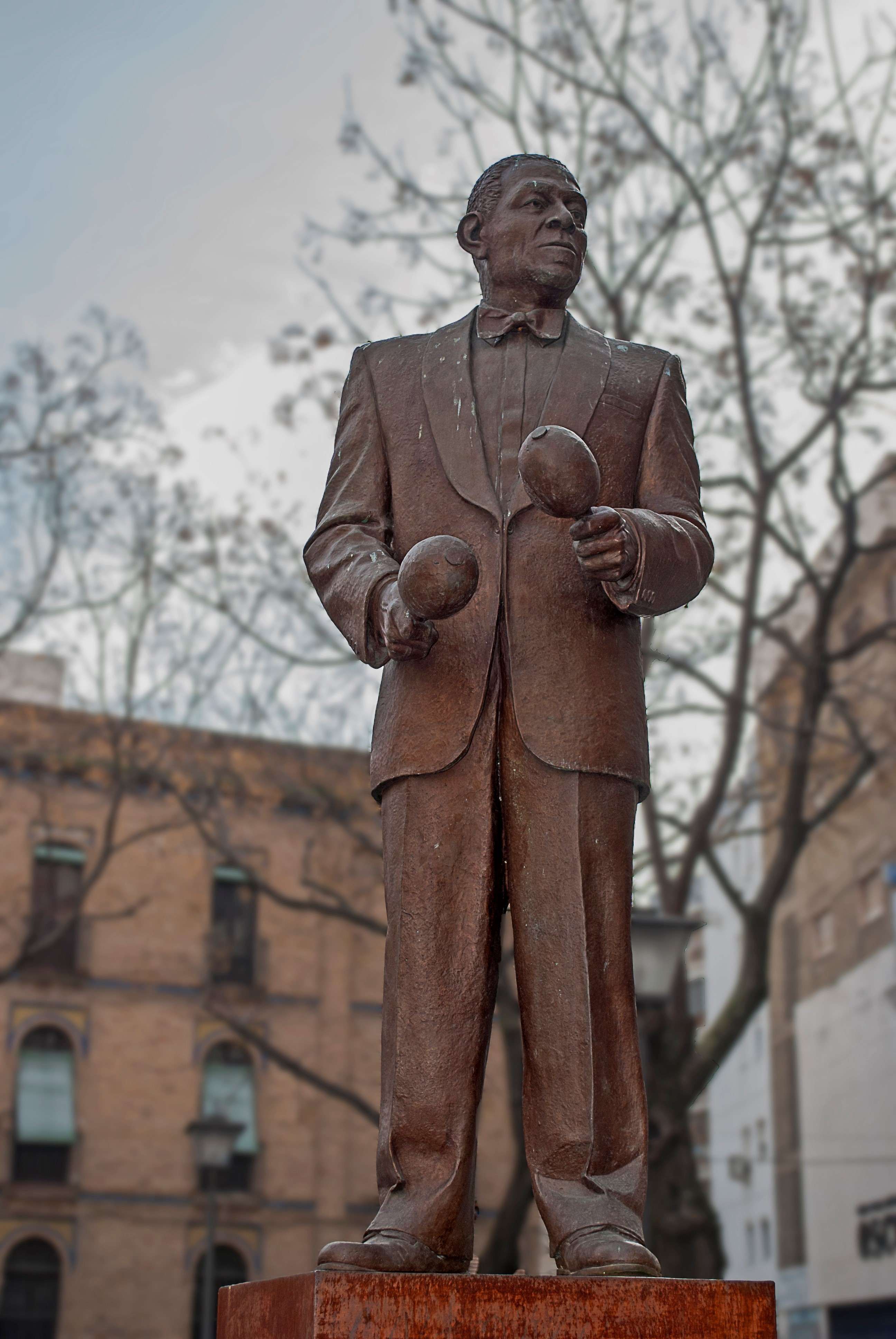 Estatua de Antonio Machín. Sevilla, España.